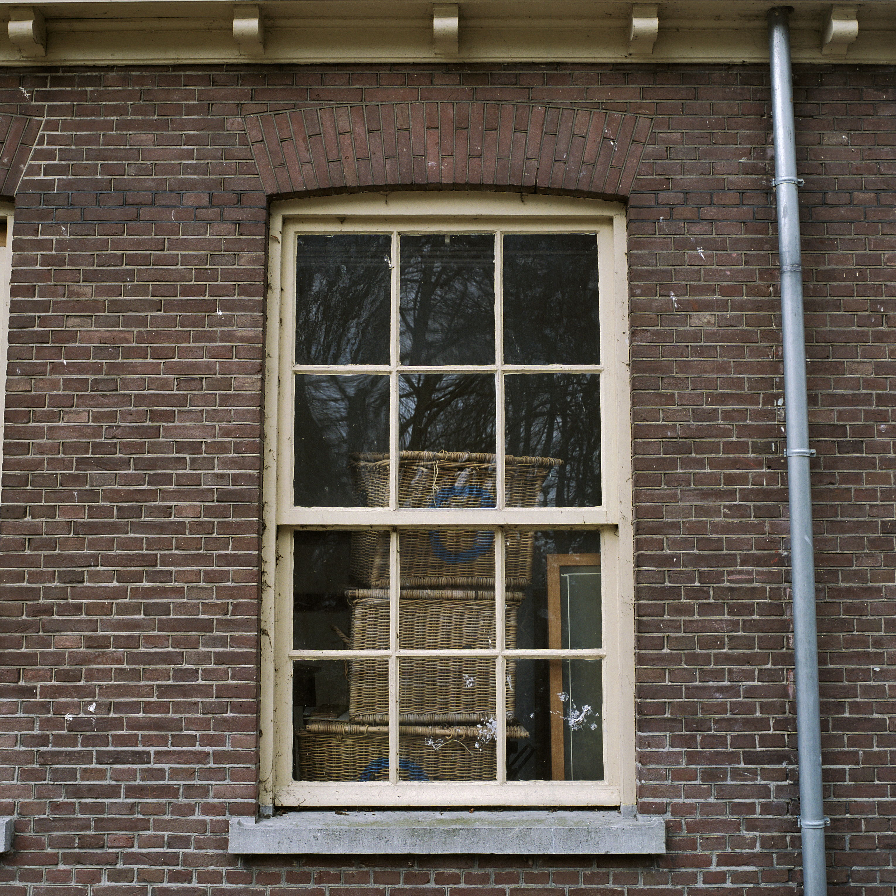 Twaalfruits schuifraam